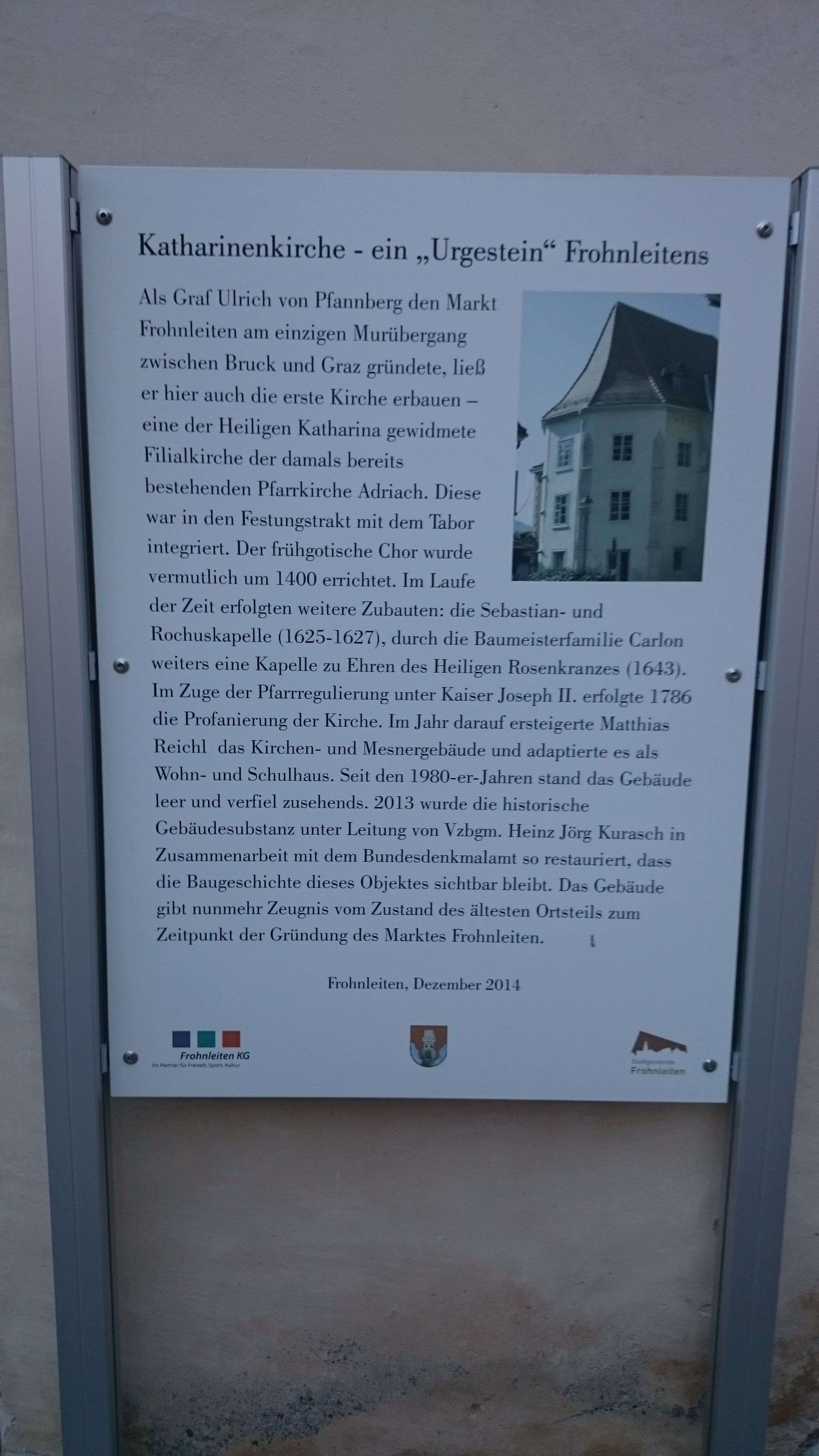 Frohnleiten